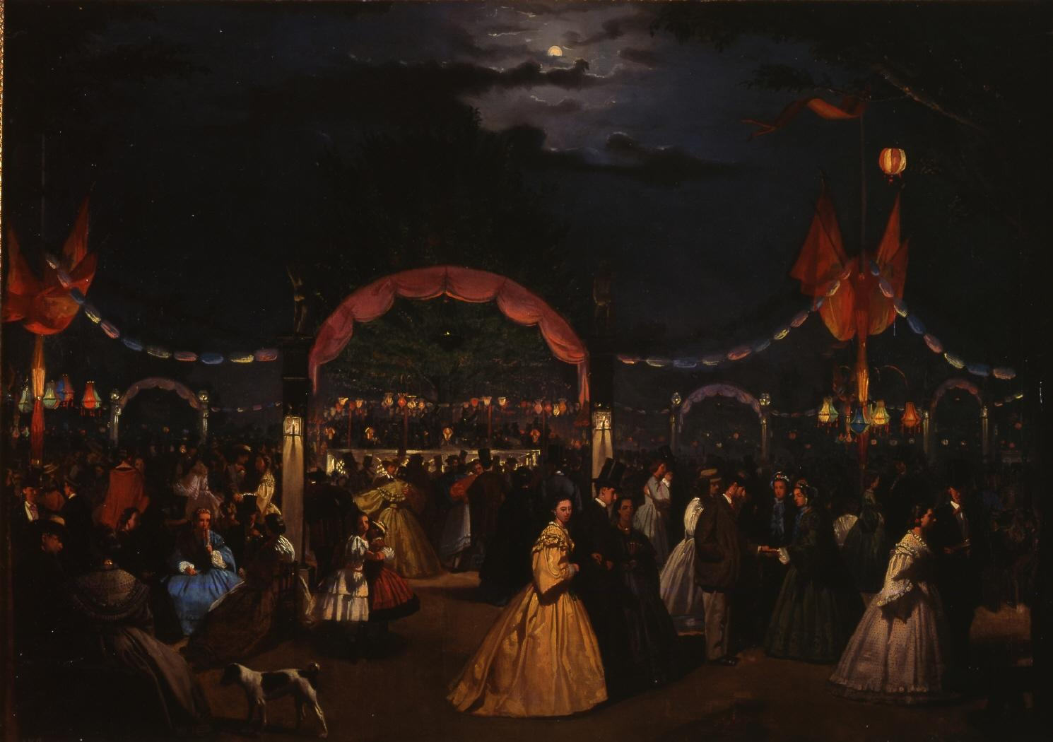 El jardín público de Madrid llamado El Paraíso, en noche de baile.